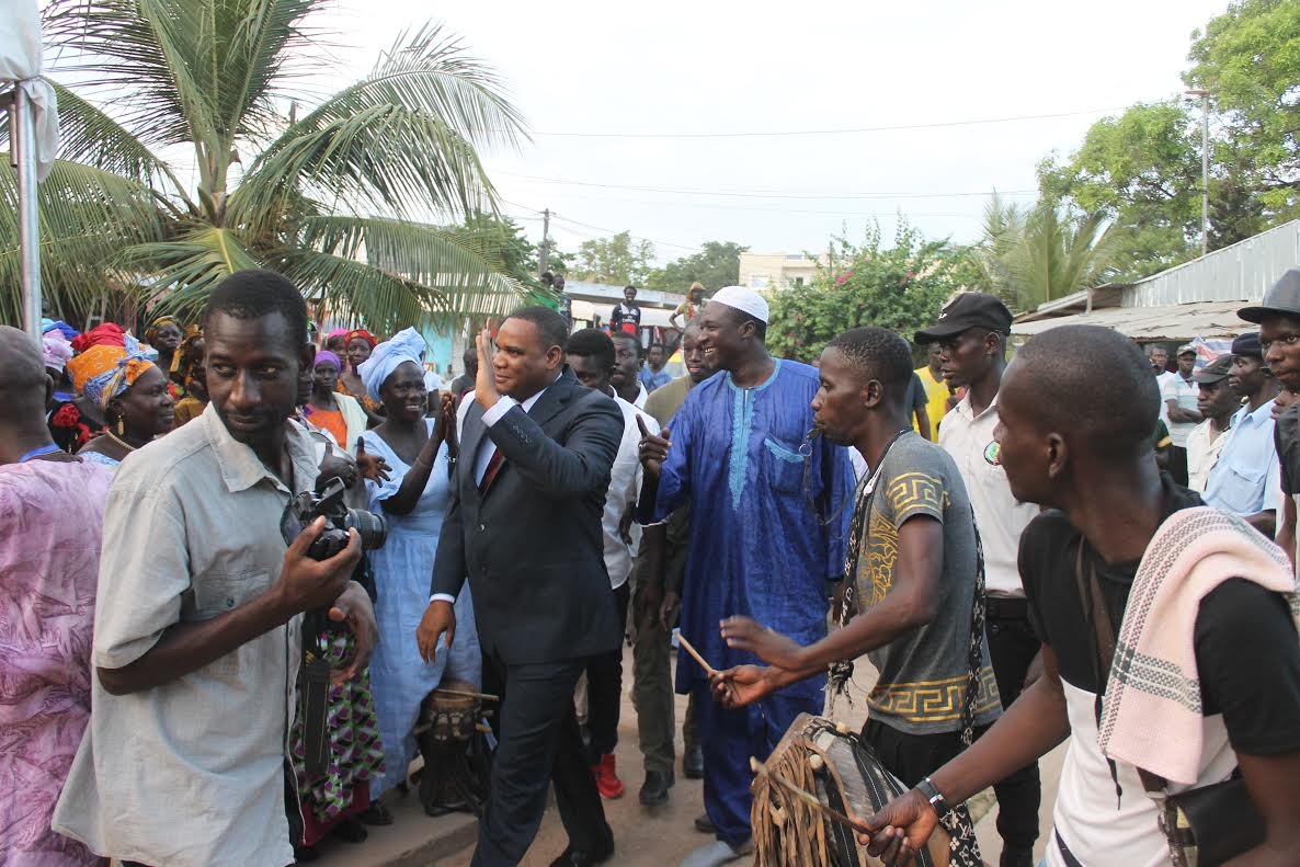 Photo de la Déclaration de Candidature d'Ousmane Kane le 22 octobre à M'Bour.